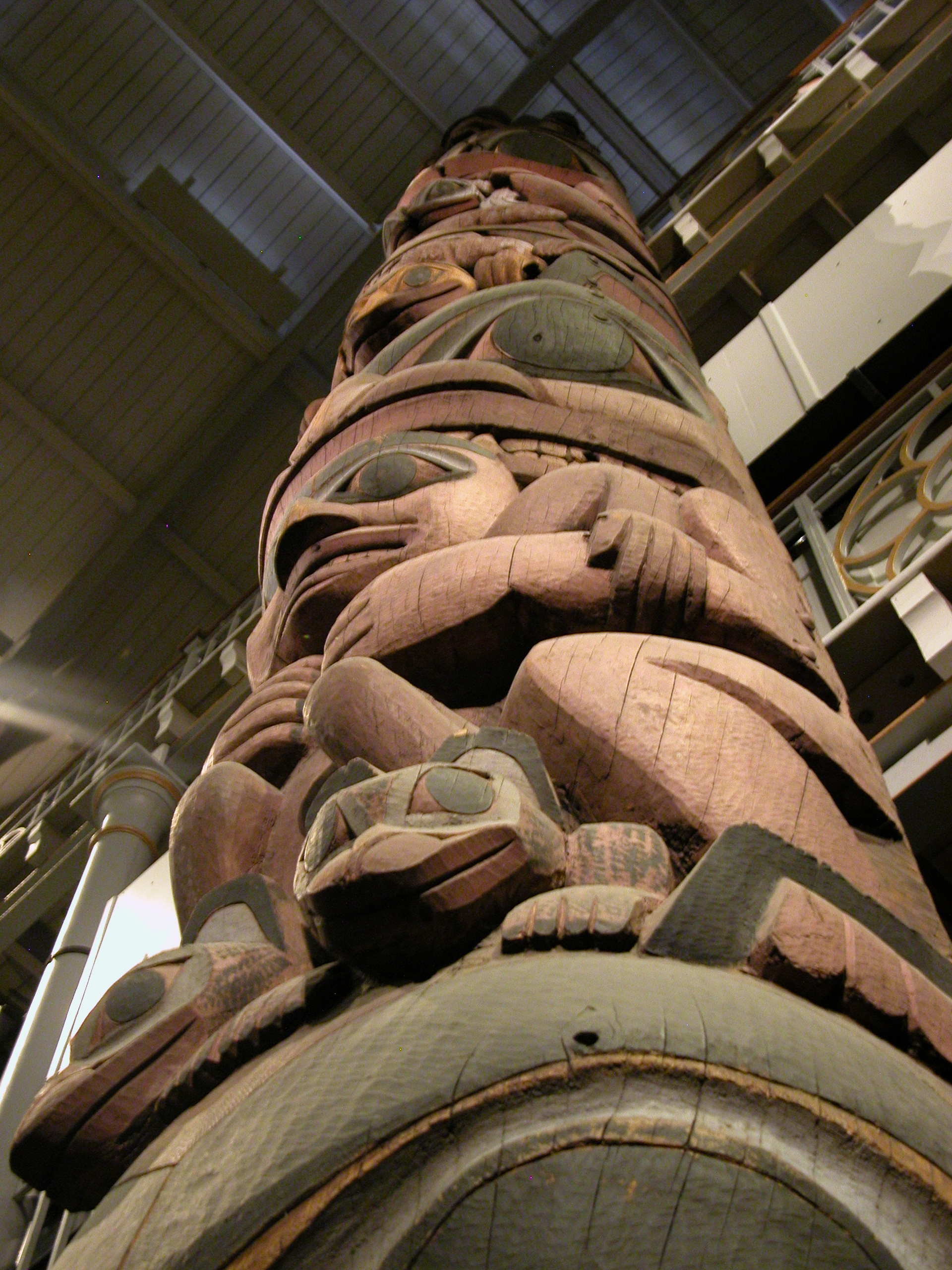 Pitt Rivers Museum Totem pole